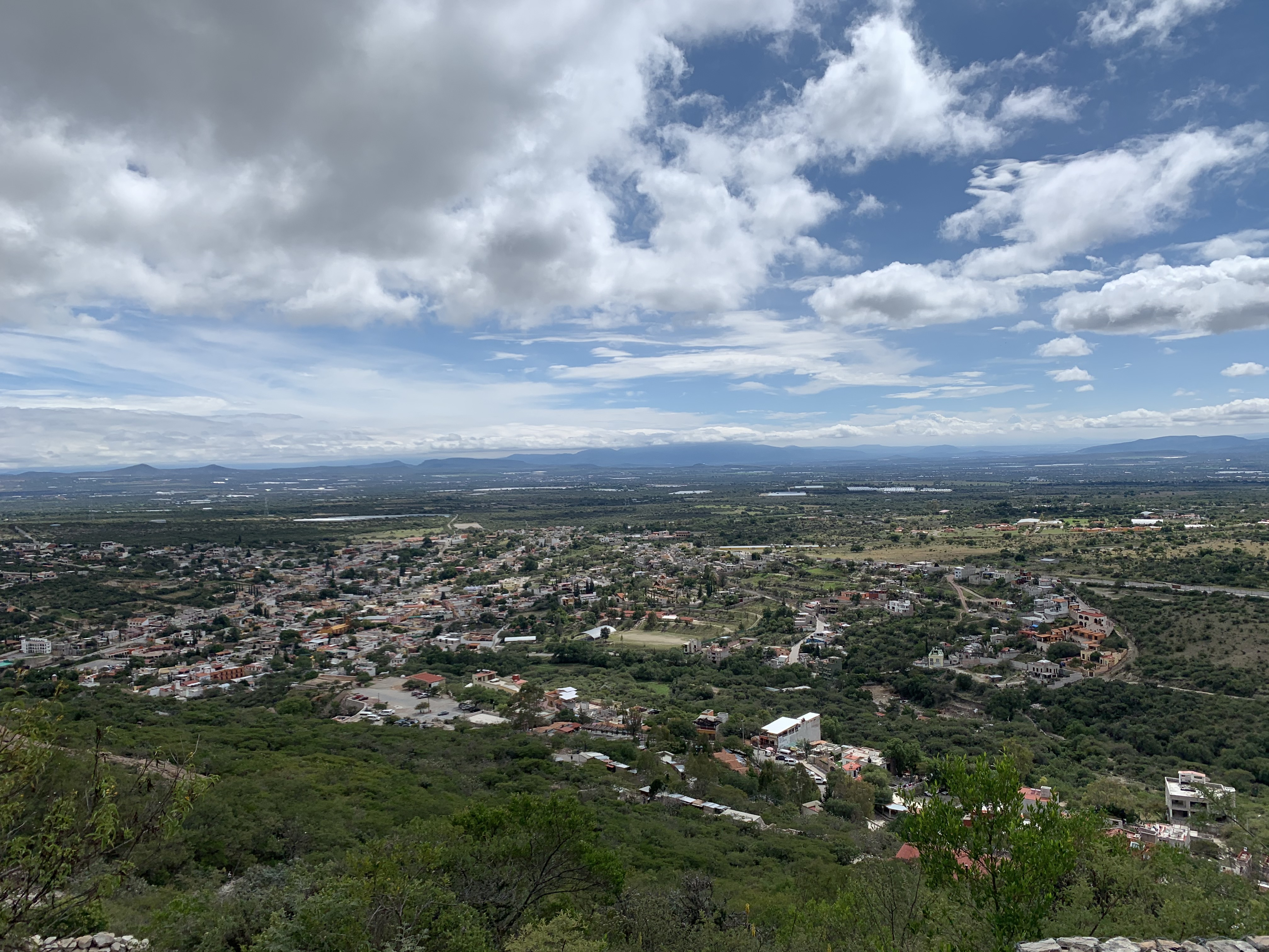 Peña de Bernal Vista desde el Monolito , Peña de Bernal, Querétaro,México.